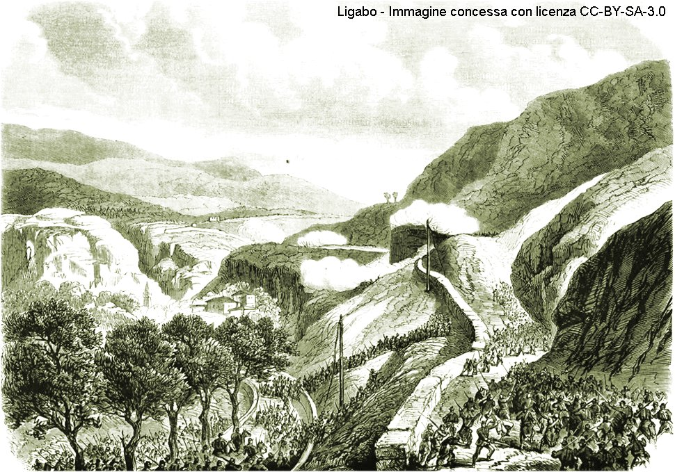 Combattimenti tra gli austriaci del maggiore Carlo Pichler von Deeben e la colonna italiana del generale Giacomo Medici per il possesso di Primolano il 22 luglio 1866